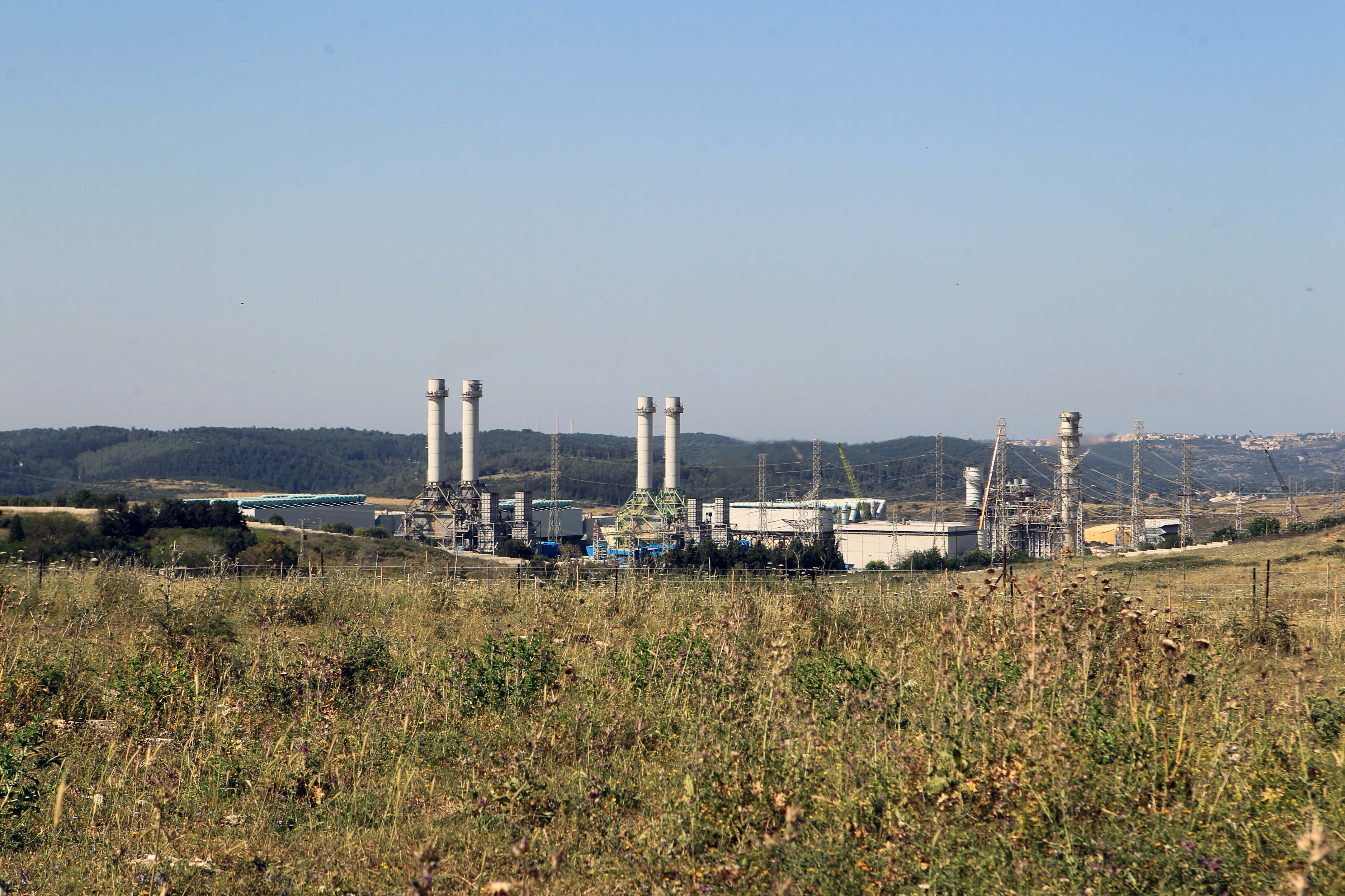 תחנת הכוח חגית